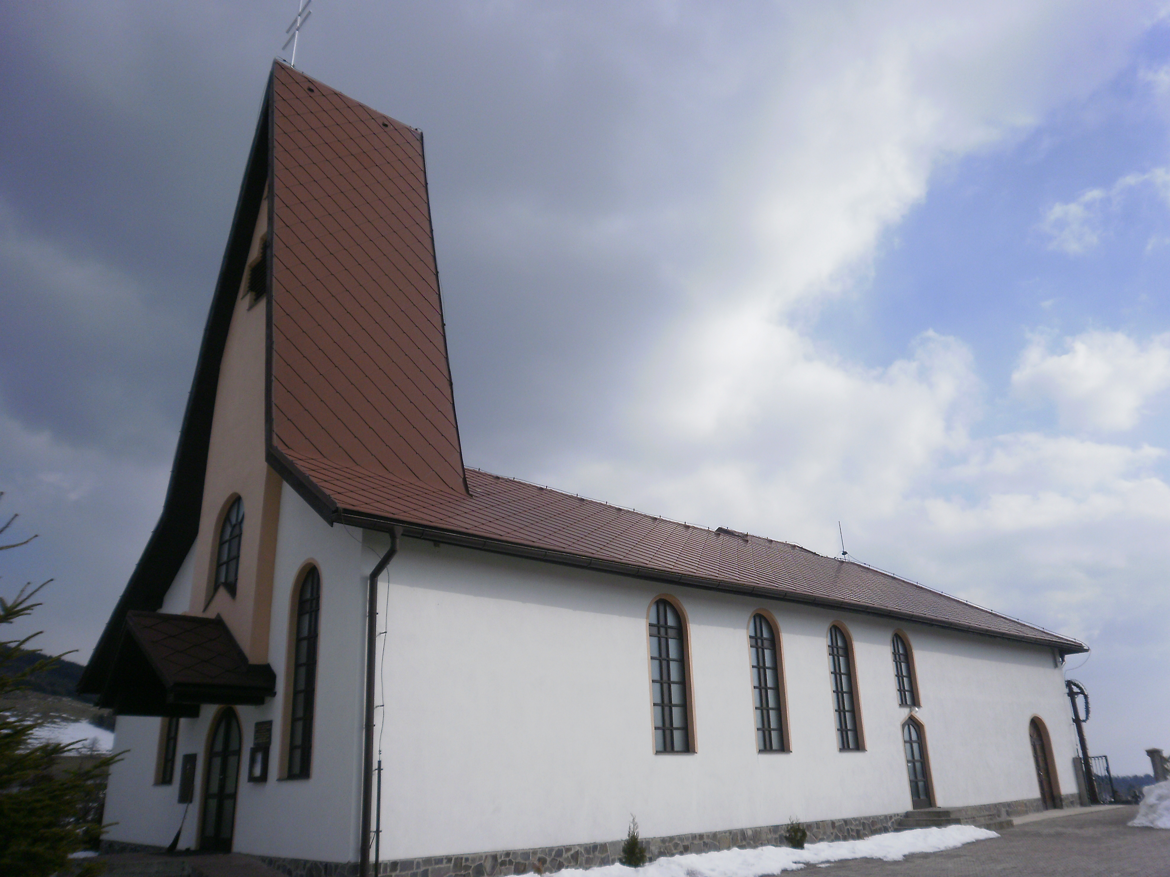 fotka kostola v Látkach